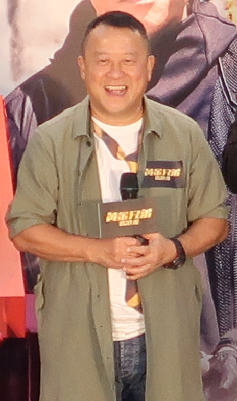 Eric Tsang Chi Wai